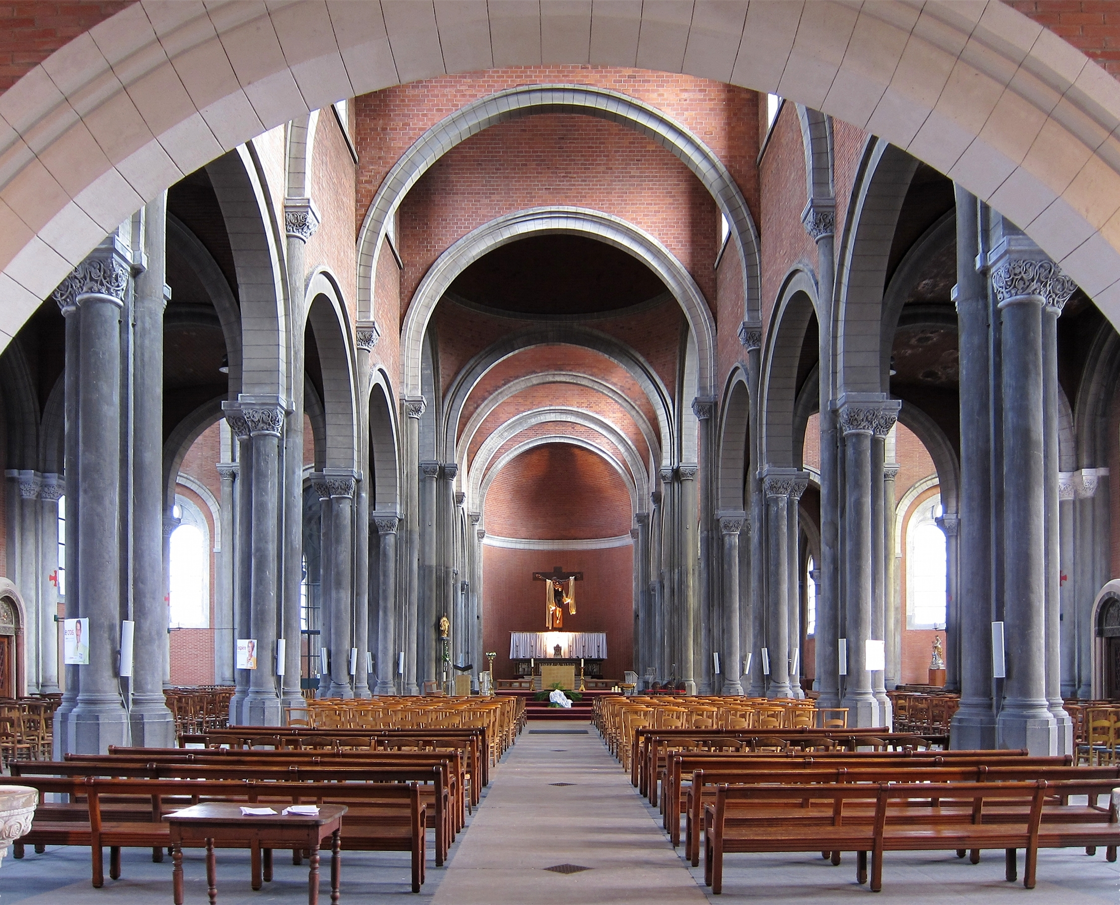 La nef de l'Église Saint-Pierre Saint-Paul de Lille.